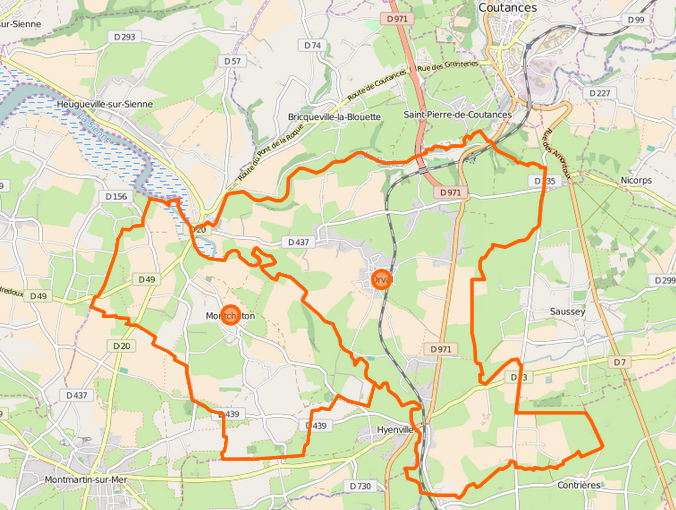 Carte de la commune nouvelle et de ses communes déléguées